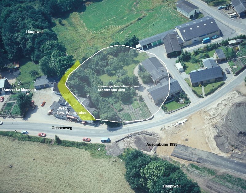 Luftaufnahme mit Blick nach Osten auf ehemaliges Café Truberg. Gelb markiert die bei Ausgrabungen 2010–14 erkannten Befunde ("Torweg"?)